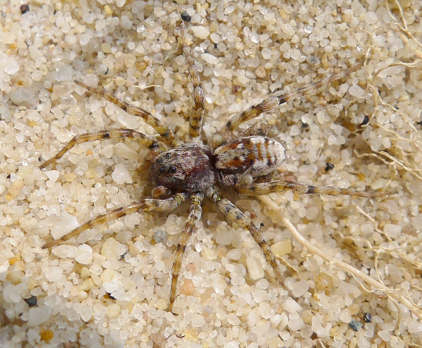 Lycosidae. Arctosa perita